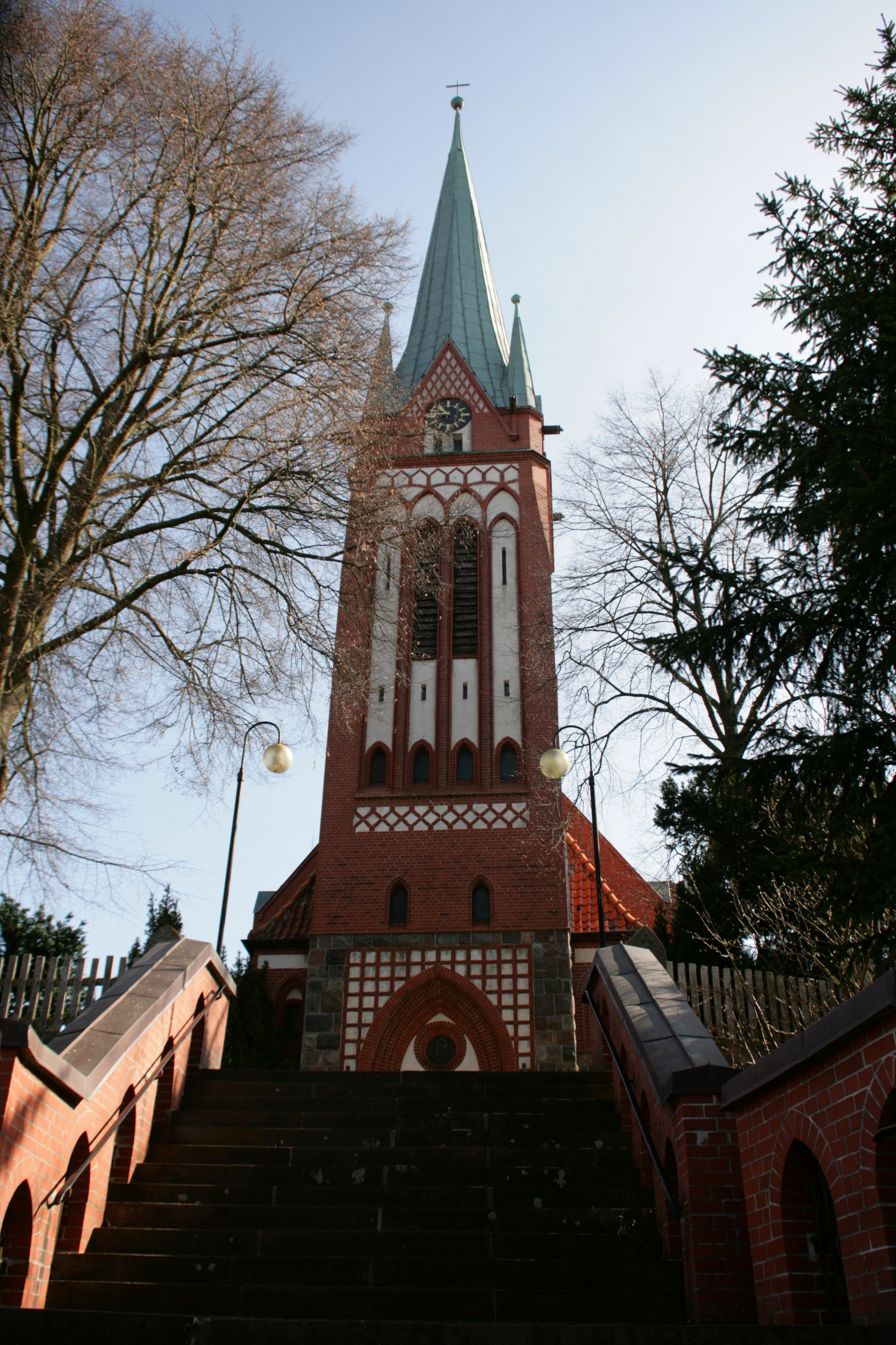 Evangelische St.-Jakobus-Kirche in Wieren